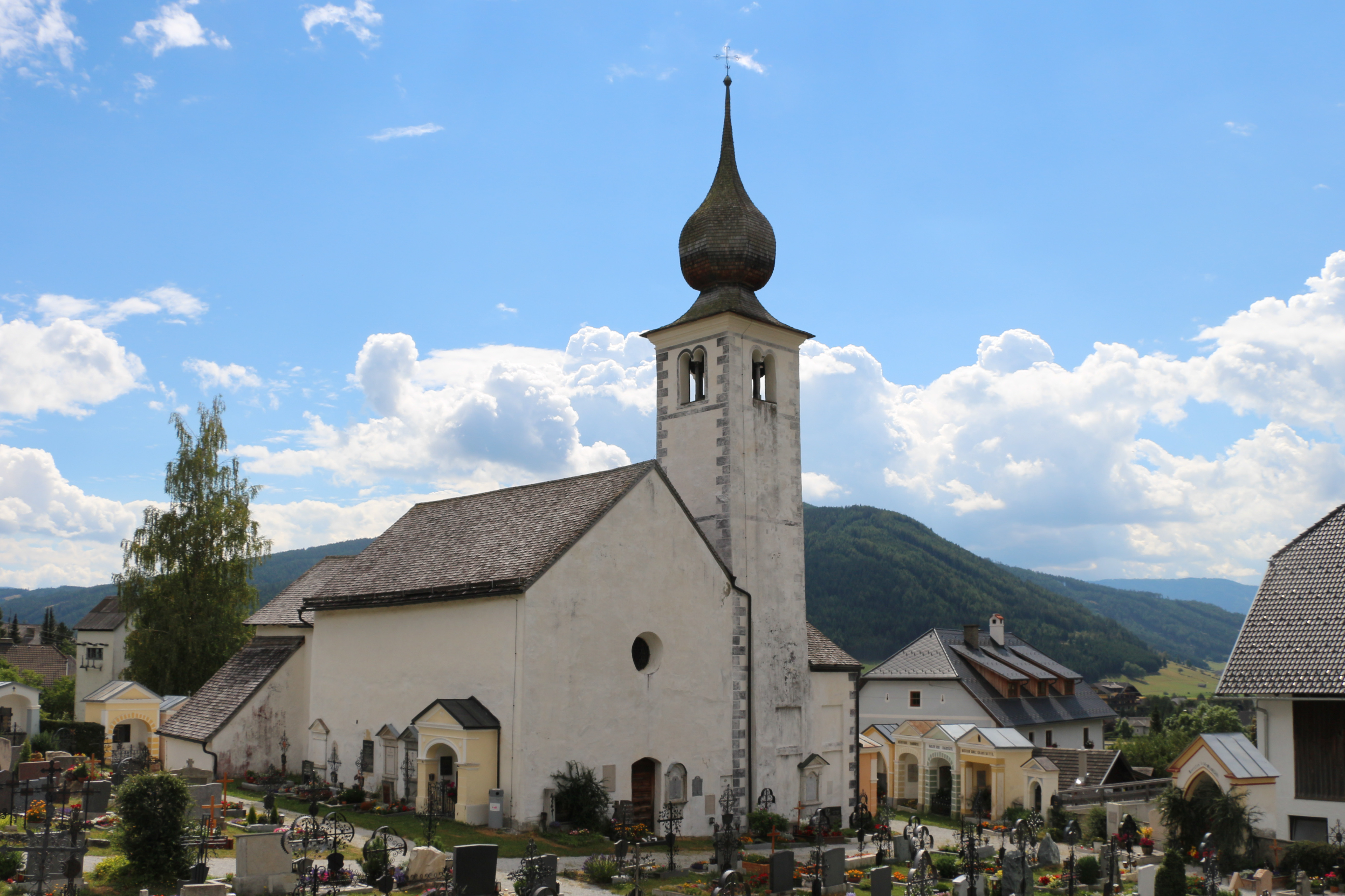 Kath. Filialkirche hl. Gertraud - Mauterndorf